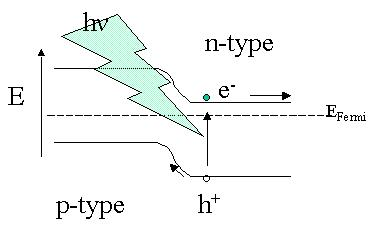 een schematische weergave van het principe van ladingsscheiding op een p-n junction